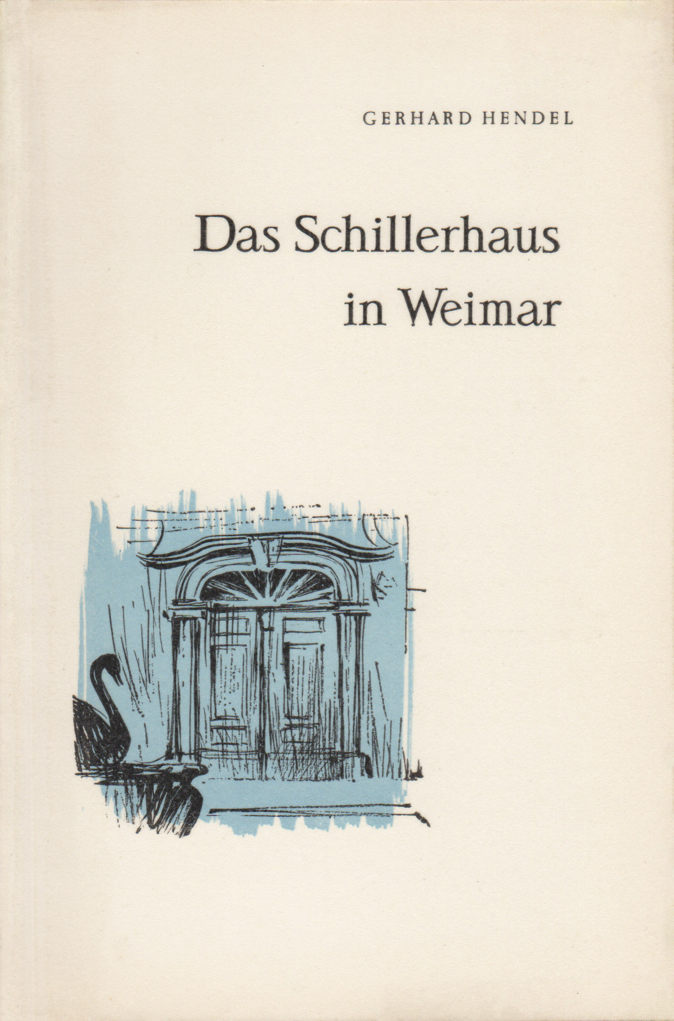 DDR-Sachliteratur, Das Schillerhaus in Weimar, Autor Gerhard Hendel, herausgegeben von den Nationalen Forschungs- und Gedenkstätten der klassischen deutschen Literatur in Weimar (2. Aufl. 1965) mit 55 Textseiten und 8 Fotoseiten mit Farbfotos auf hochwertigerem Papier, Fotos von Ernst Schäfer Weimar, Umschlagzeichnung von Horst Hausotte, Gestaltung und Bildausschnitte Herbert Kiese.